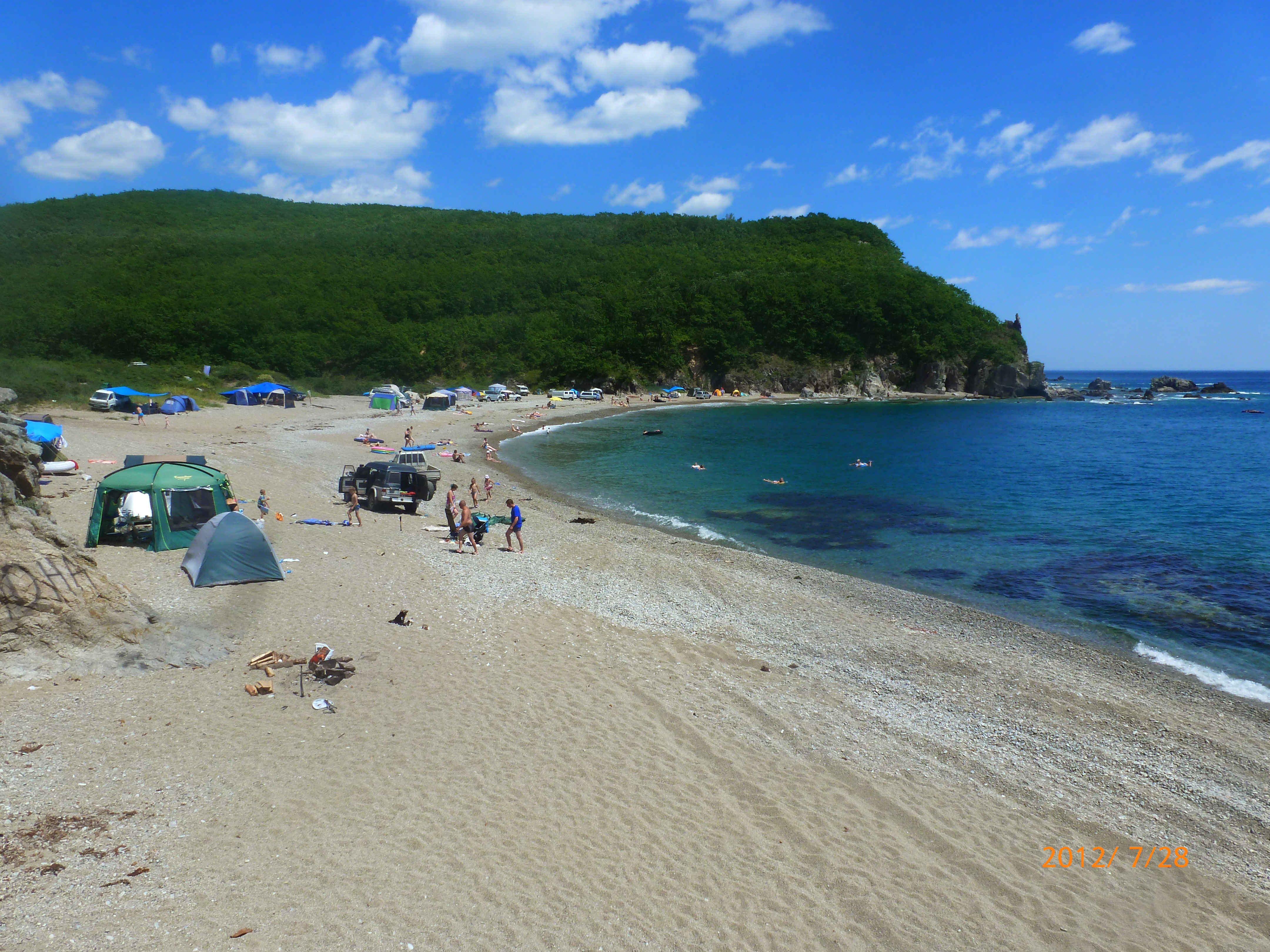 Пляж на 2-м Лан-Гоу